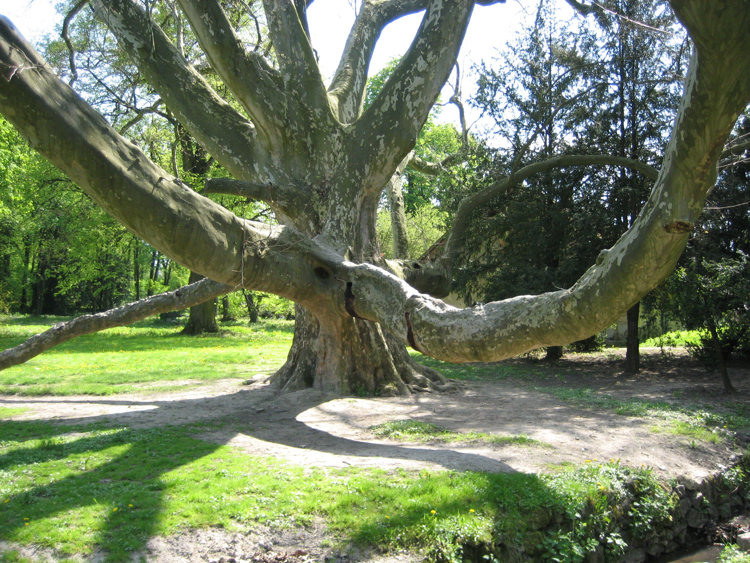 Károlyi-kastélyegyüttes és parkja, Füzérradvány – egy idős juharlevelű platán a kastélyparkban (egyes források alapján a 19. század közepén, más források szerint 1721-ben ültették) This is a photo of a monument in Hungary. Identifier: 2768